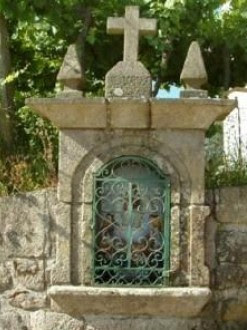 Alminhas